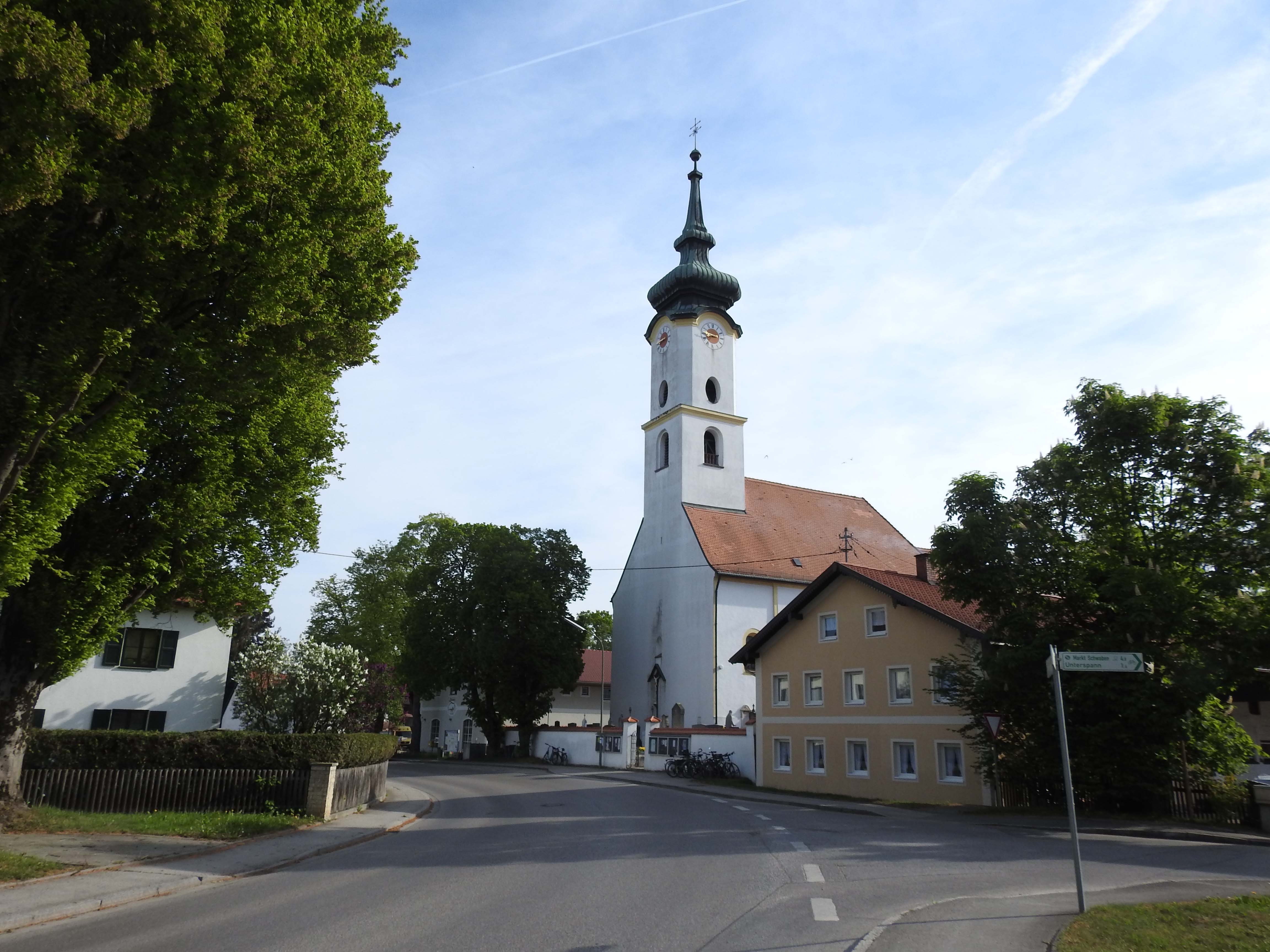 Ehem. Wallfahrtskirche in Gelting, Pliening